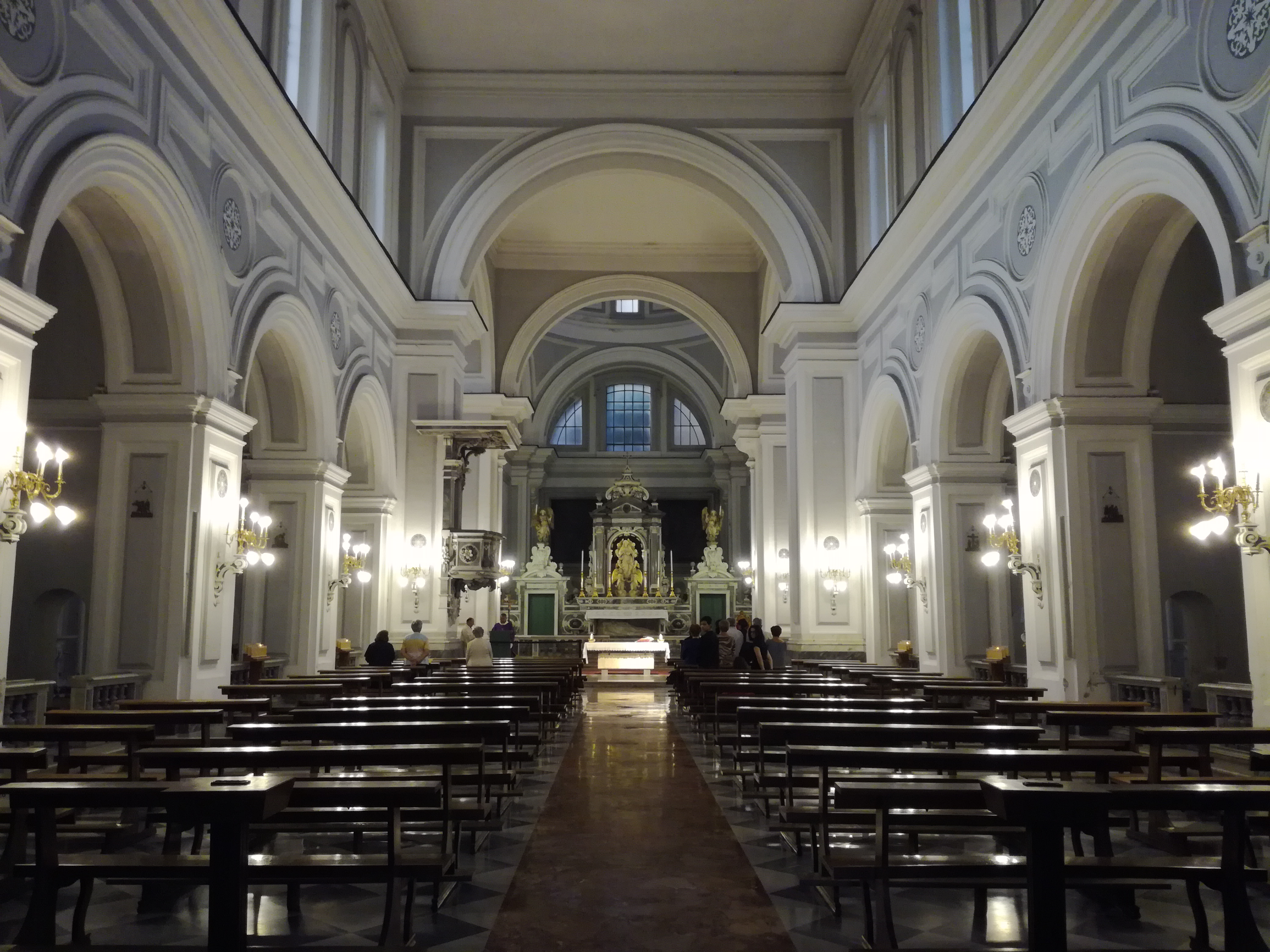 Interno Angeli alle Croci